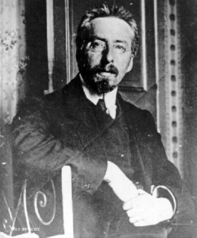 Бурцев Владимир Львович (1862—1942), фото до 1917 года